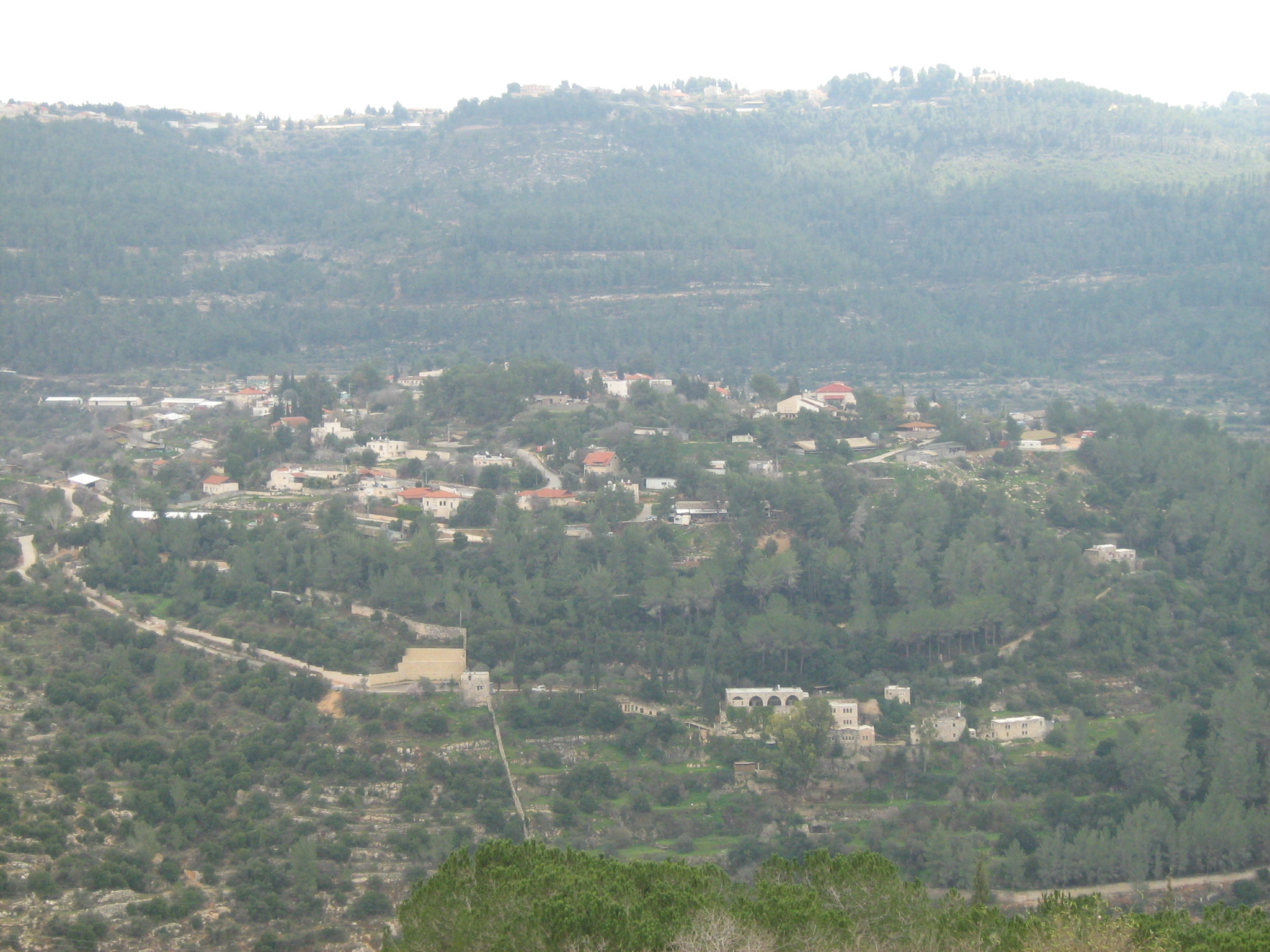 מושב אבן ספיר ומנזר יוחנן במדבר